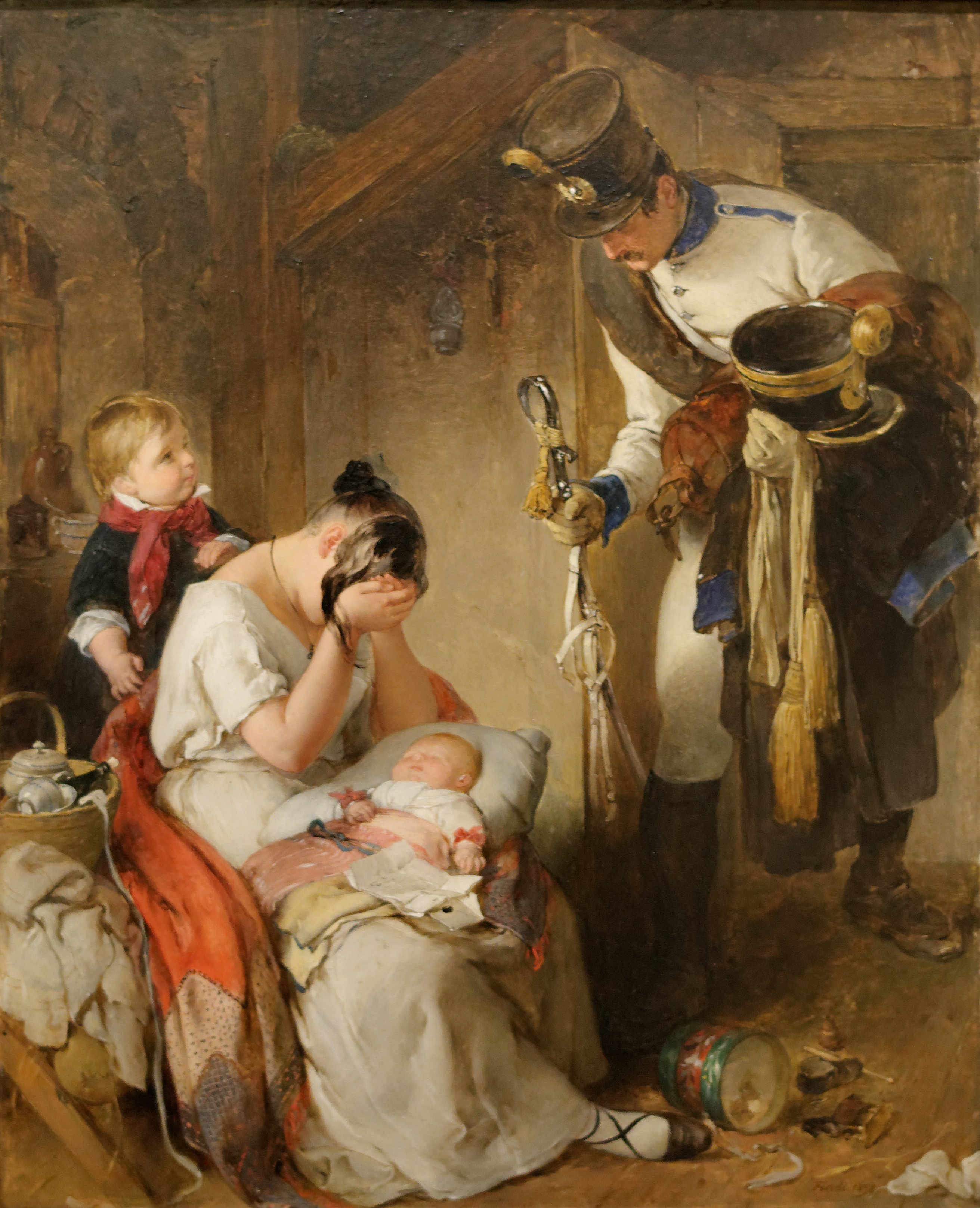 La peinture représente un militaire restituant l'uniforme d'un officier tombé au combat. Ce style pictural était destiné à attirer la sympathie du public.